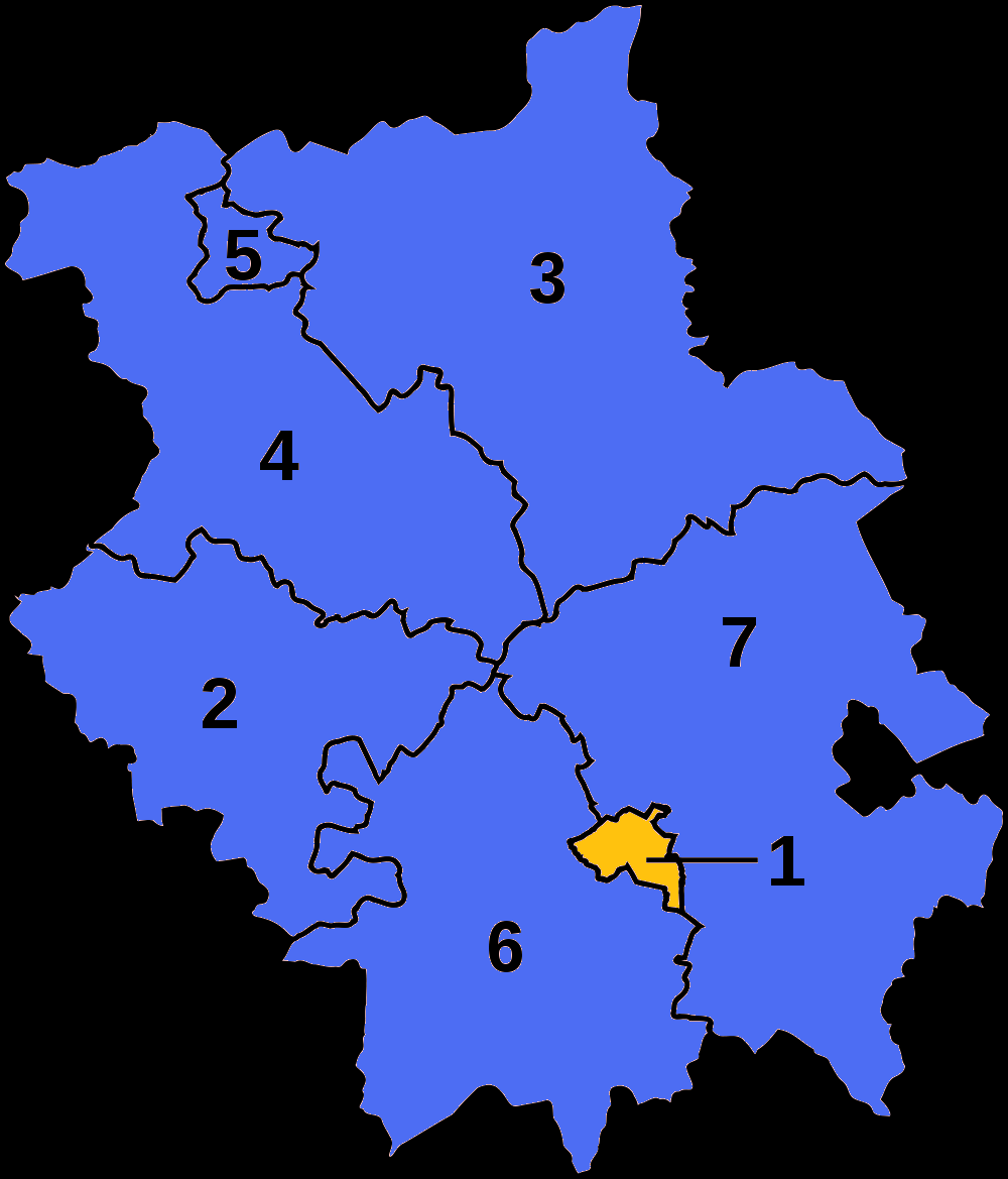 Seats won in 2005